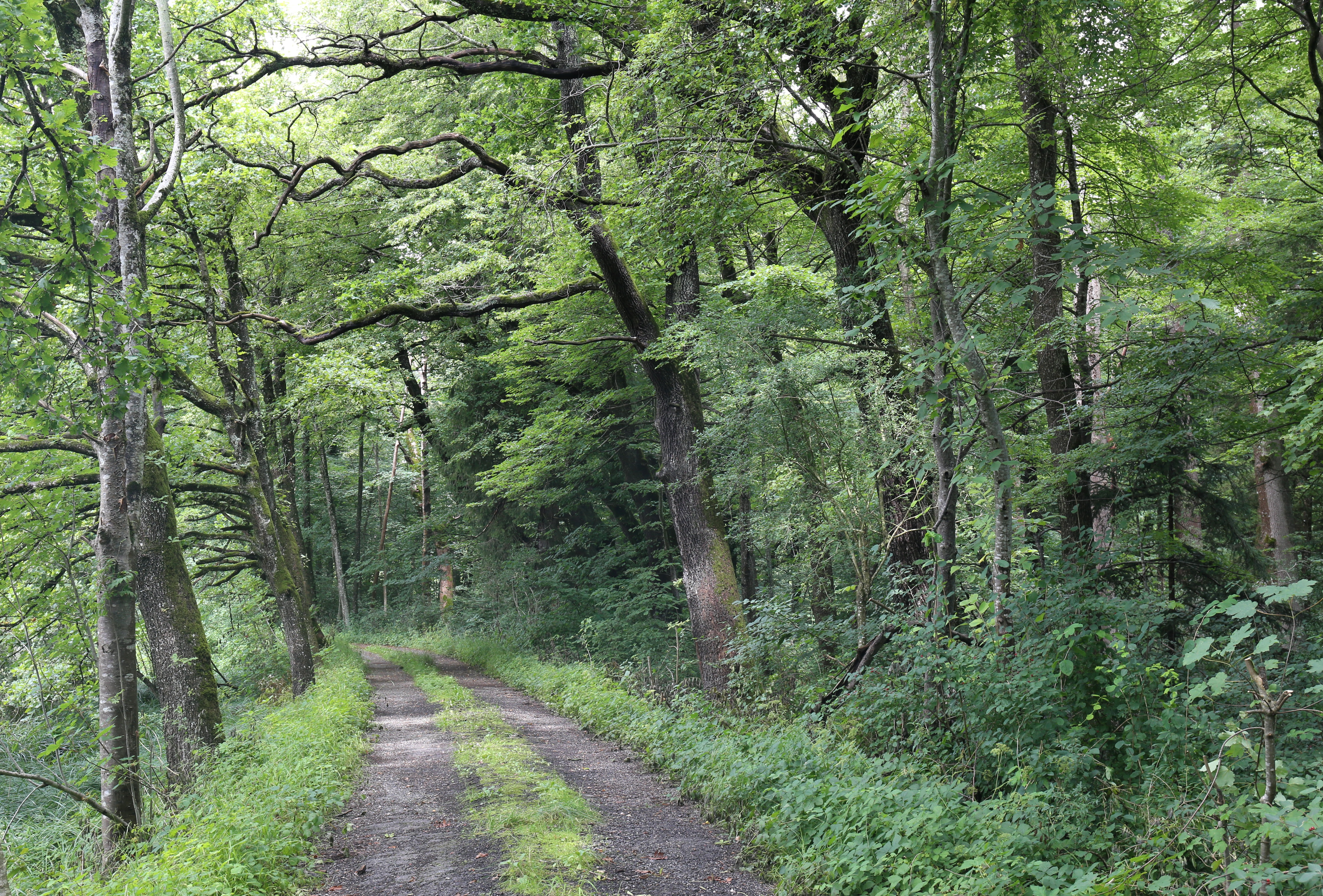 Naturwaldreservat Neukreut, Raubling; Kennung 09-076, 8,8 ha, seit 1978. Auwaldbestand (Edellaubholz mit Eiche) auf alluvialen Ablagerungen in der Inn-Jungmoräne